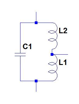 Joonis 1. Hartley ostsillaatori võnkering